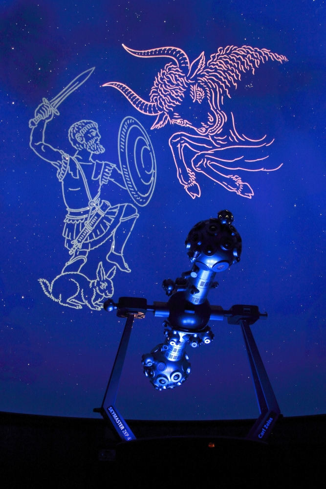 Le projecteur ZKP4 du Planétarium de Reims avec les représentations des constellations d'Orion et du Taureau.